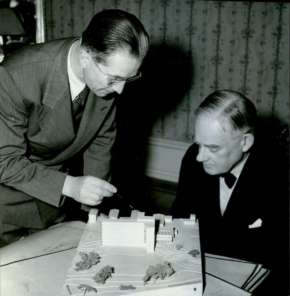 Arkitekt Gustaf Birch-Lindgren (1892-1969) visar en modell av en planerad utbyggnad av Stockholms sjukhem för styrelseordföranden justitierådet Hilding Forssman (1886-1964).